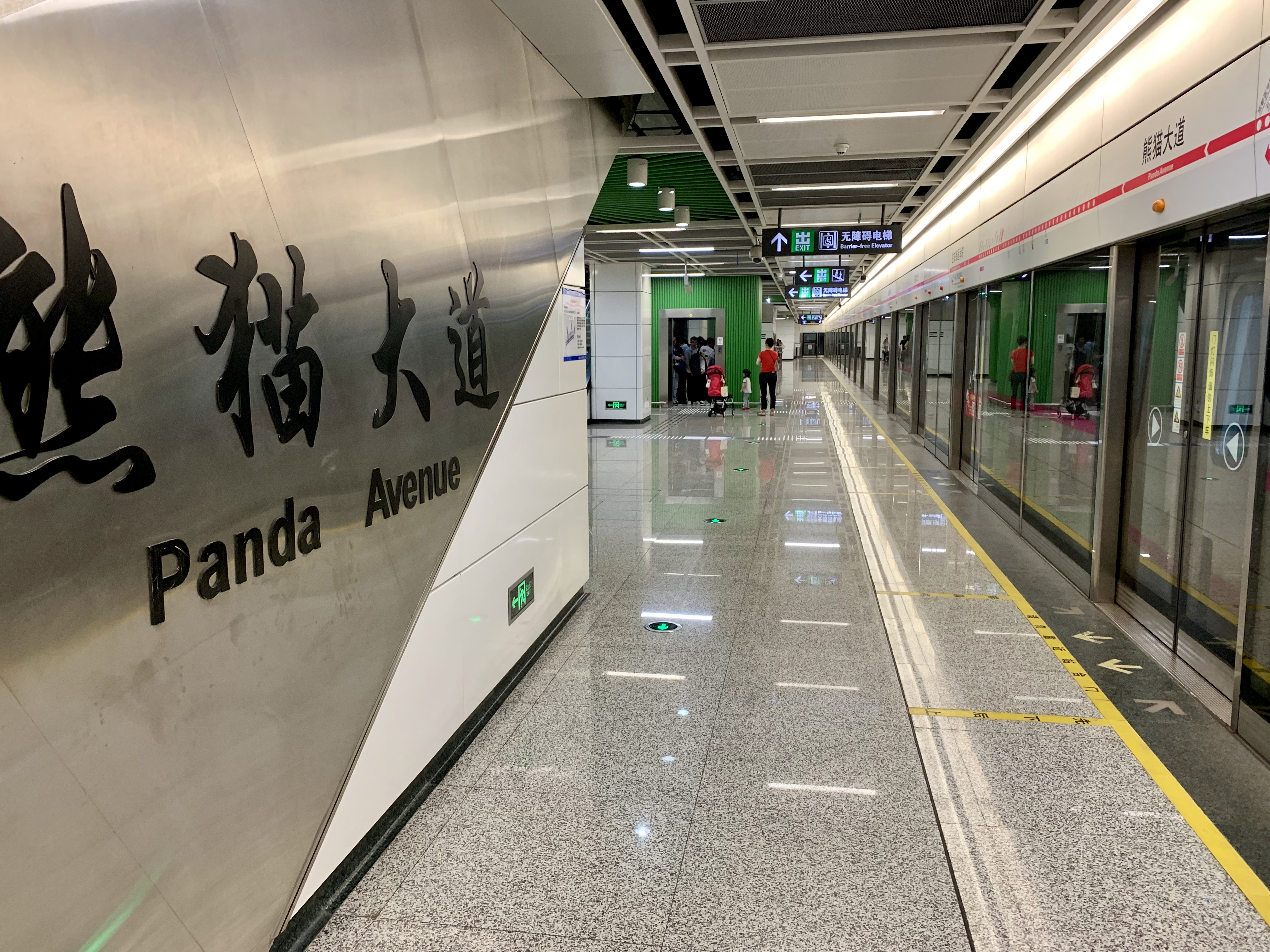 成都地铁熊猫大道站